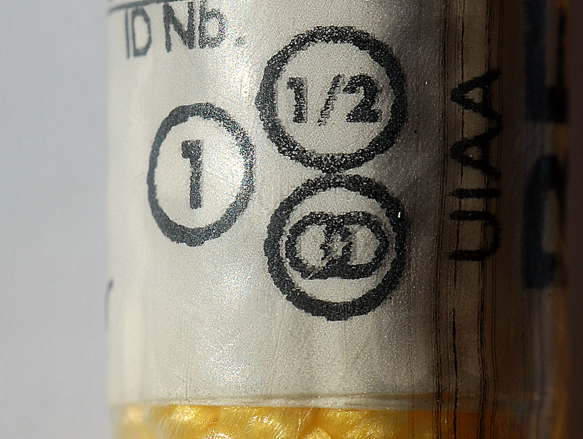 Markierung am Ende eines Kletterseils mit den Symbolen für Einfachseil, Halbseil und Zwillingsseil